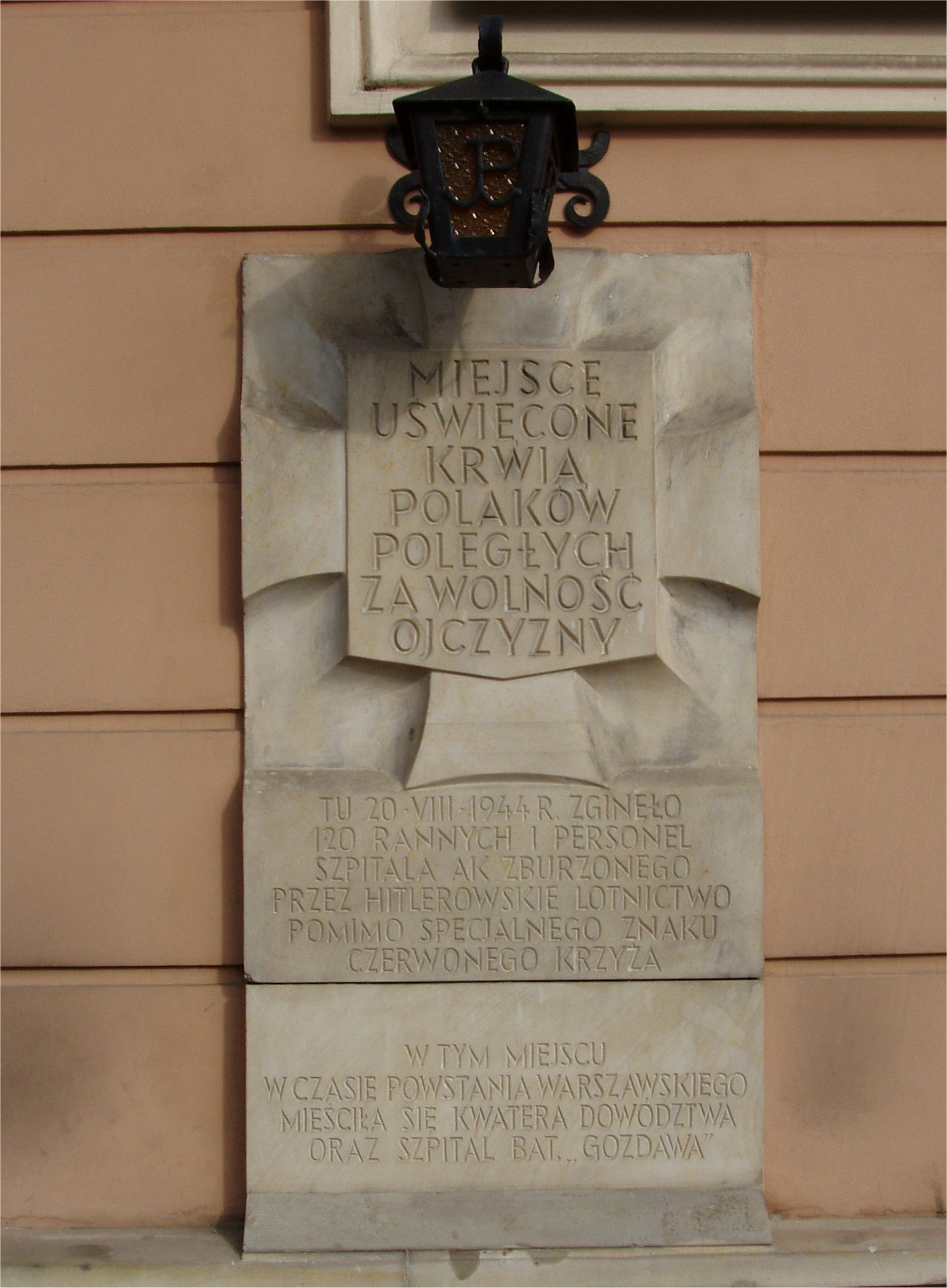 Przy ul. Długiej od strony placu Krasińskich w Warszawie (fot Zu)